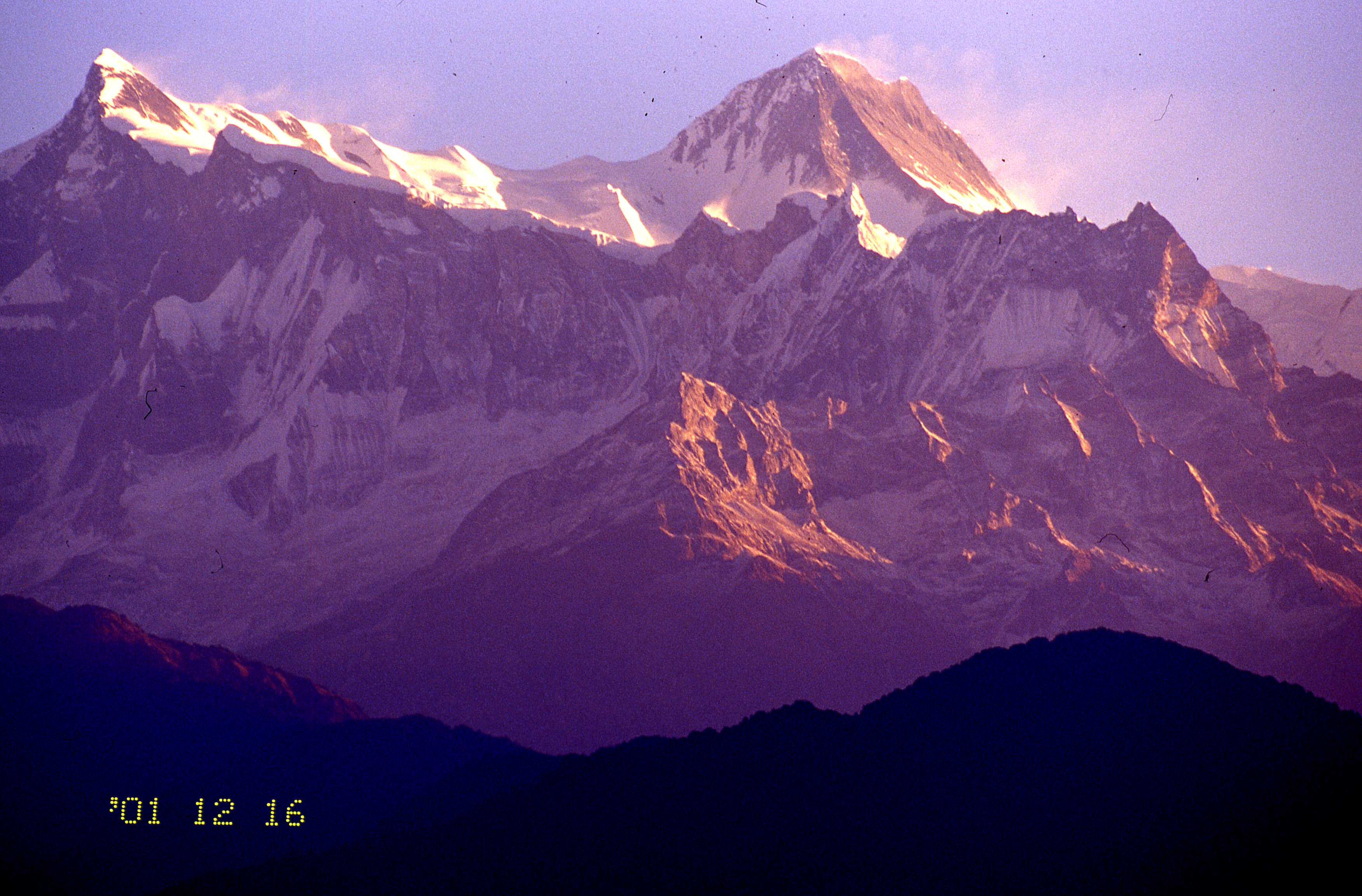 アンナプルナⅢ、マチャプチャレ ～photo by Autumn Snake 【おぉたむ すねィく探検隊】写真部門 担当 大原佳苗